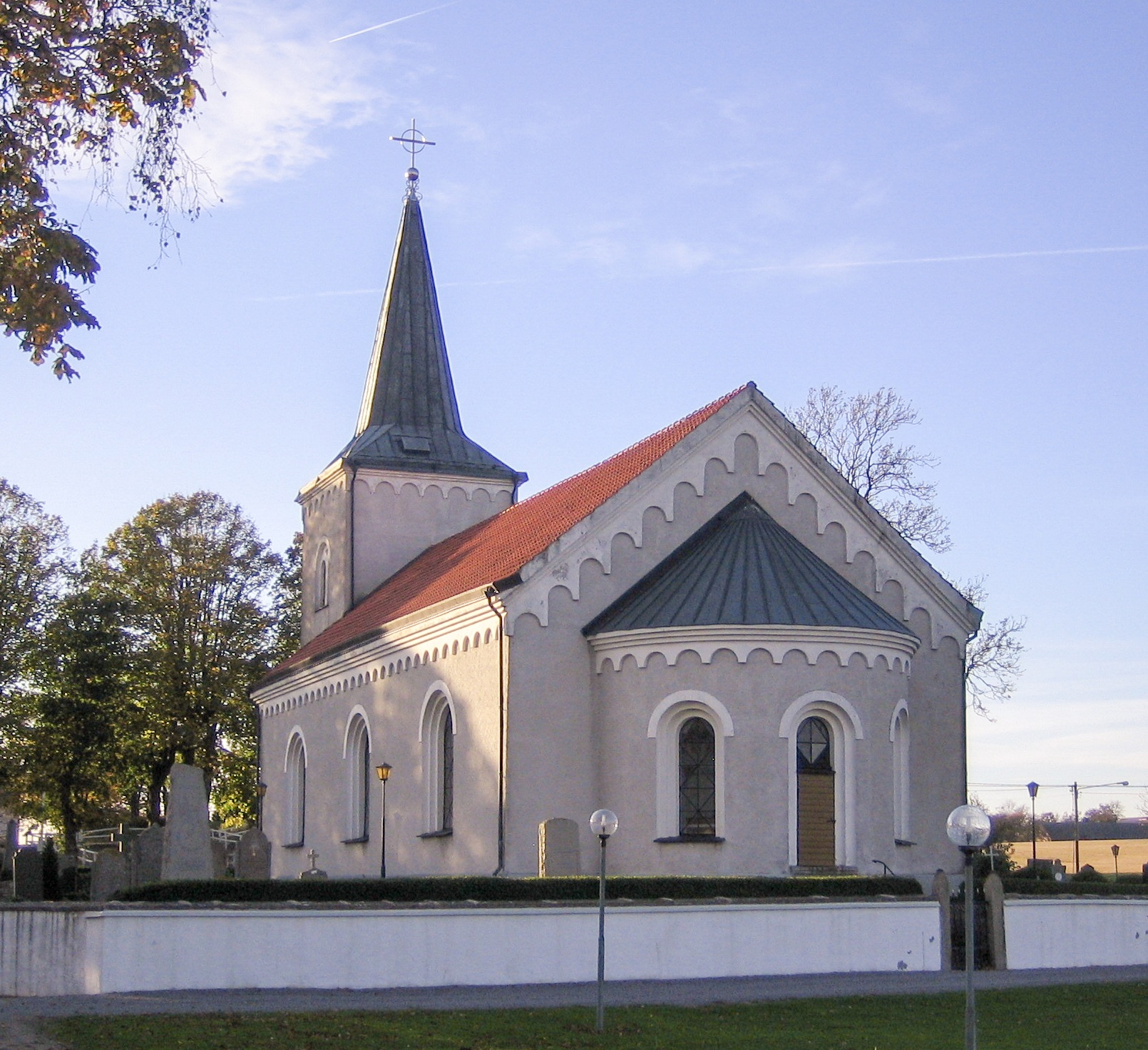 Solberga kyrka, Skåne, Sweden.